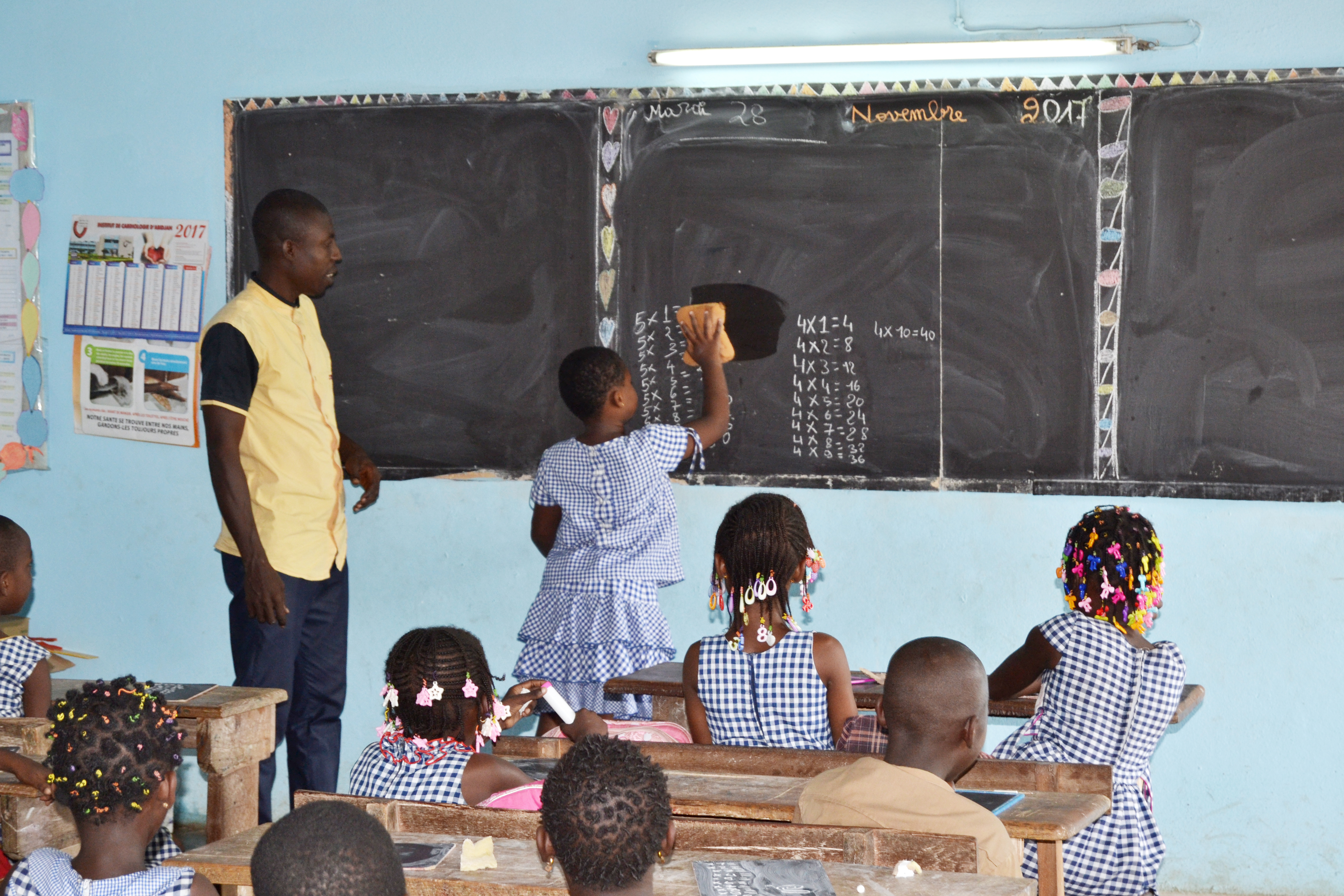 Un instituteur ivoirien dispensant des cours dans une classe de CE2 à Abidjan (Côte d'Ivoire).